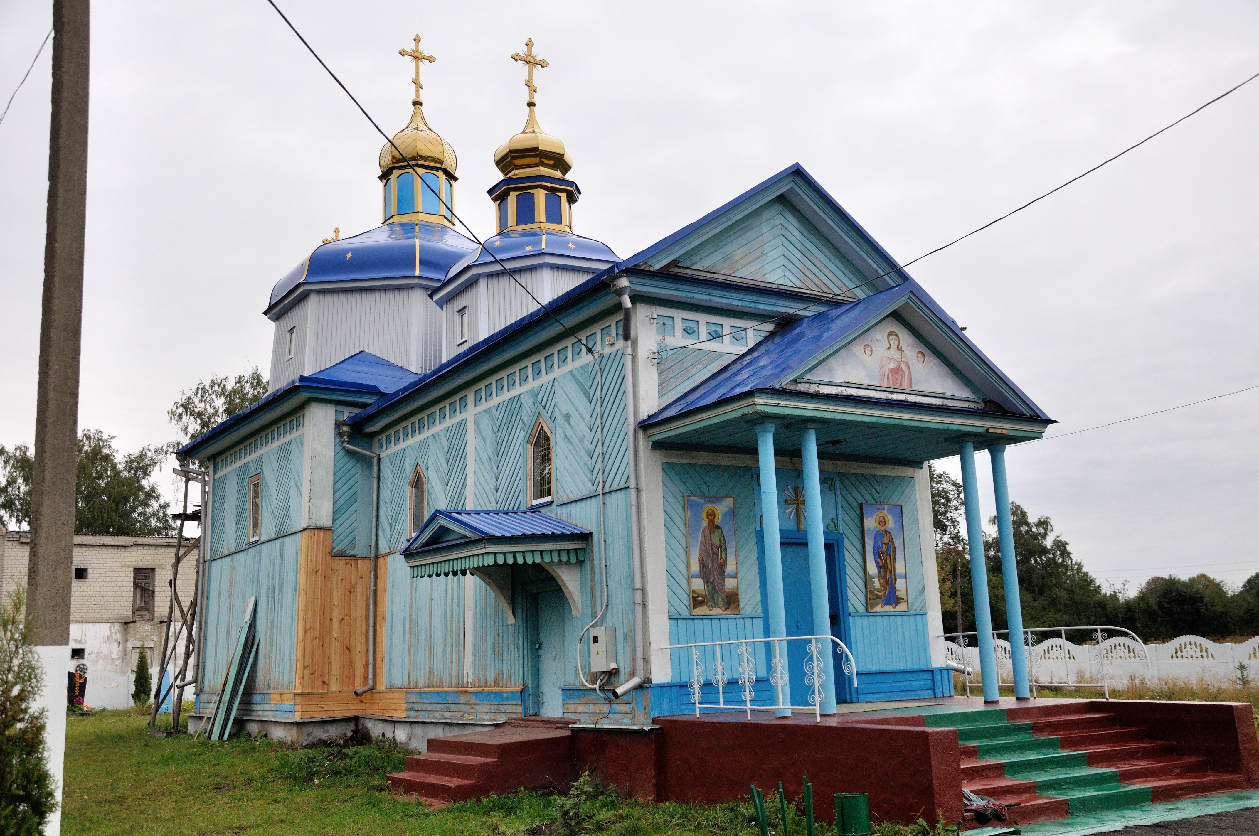 Церква Св.Параскеви, 1745р. с. Майків